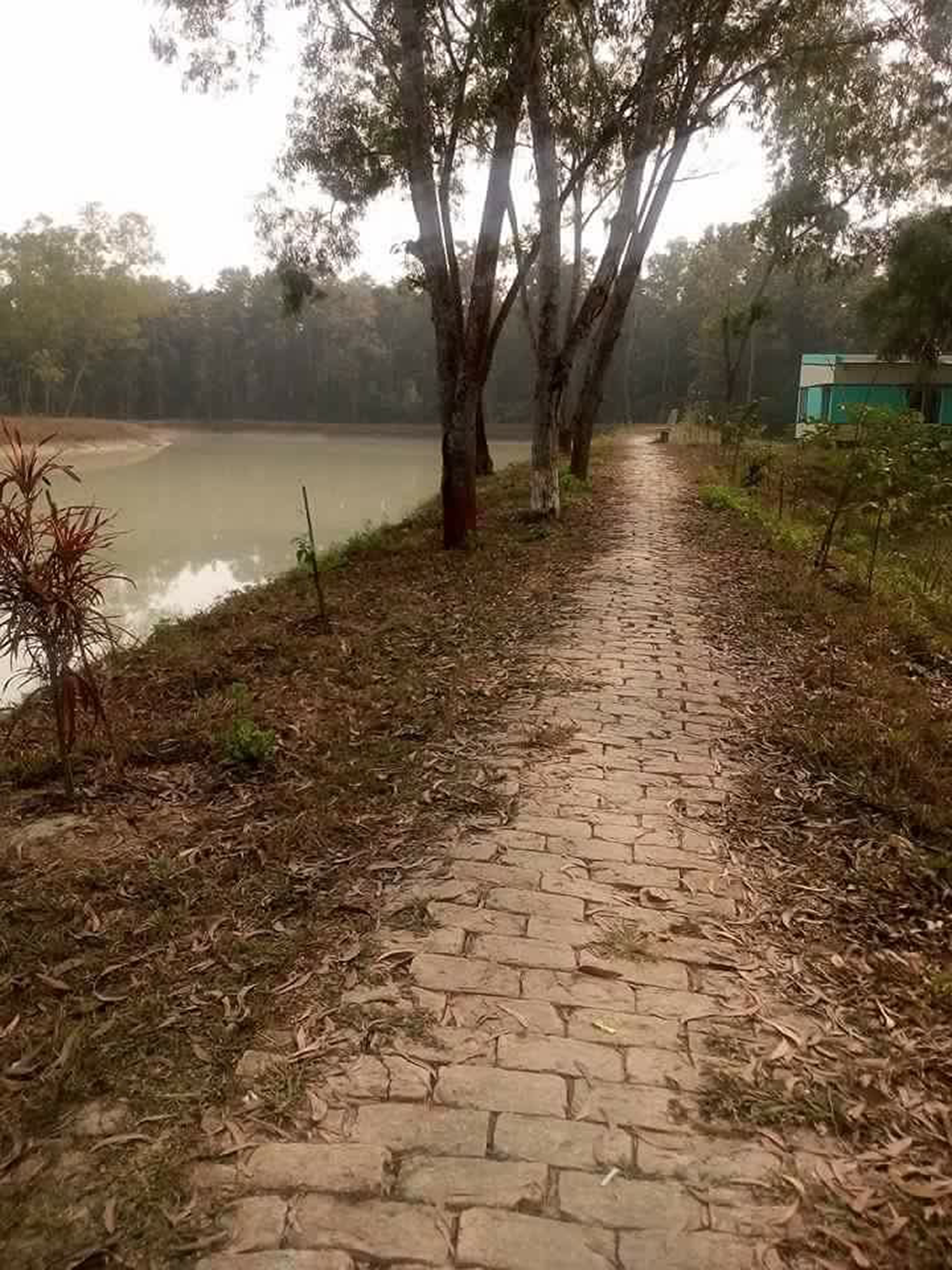 কাদিগড় জাতীয় উদ্যান